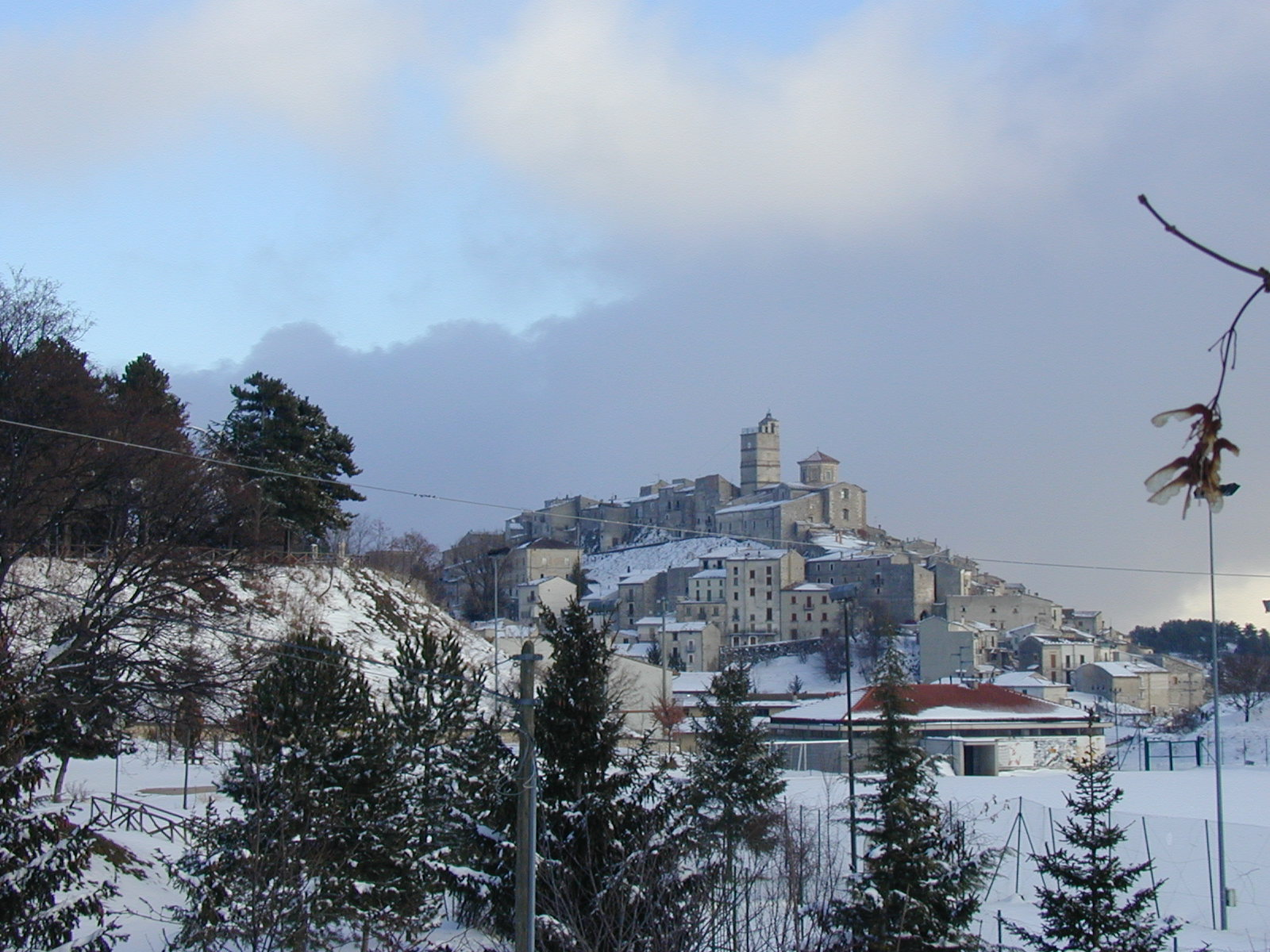 Driving into Castel del Monte, Abruzzo